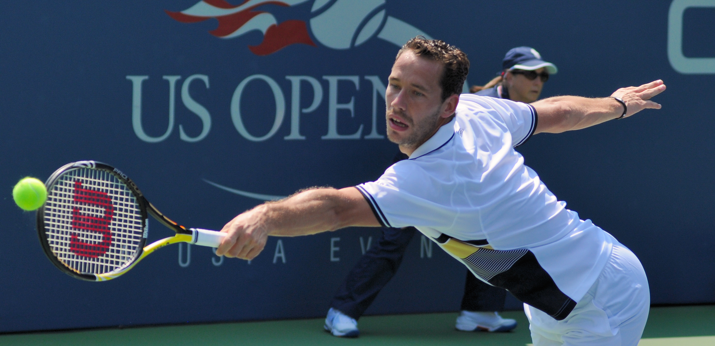 Michael Llodra - US Open 2010